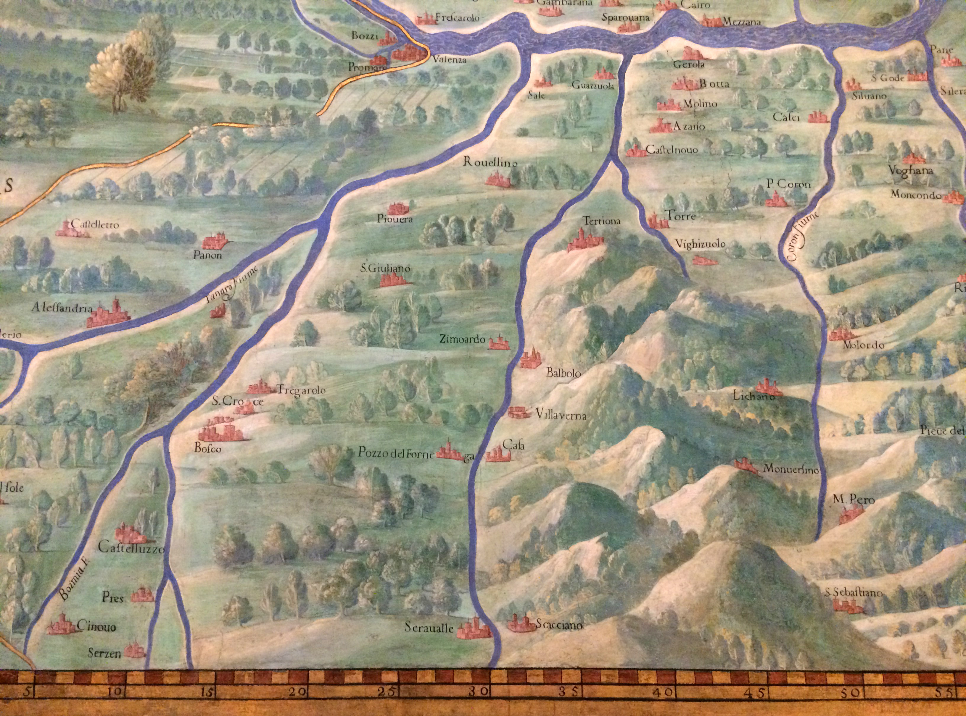 Immagine particolare dell'affresco del XVI secolo della carta geografica del Ducato di Milano all'interno della Galleria delle carte geografiche nei palazzi Vaticani, oggi inclusa nel perimetro dei Musei Vaticani. In primo piano, al centro, l'area della Fraschetta delimitata dal fiume Bormida e dal Fiume Scrivia. Si possono notare la città di Alessandria e, più a destra, San Giuliano (in seguito suddivisi in San Giuliano Vecchio e San Giuliano Nuovo). Tra Alessandria e San Giuliano è possibile scorgere l'immagine di un piccolo borgo che corrisponde a Marengo.